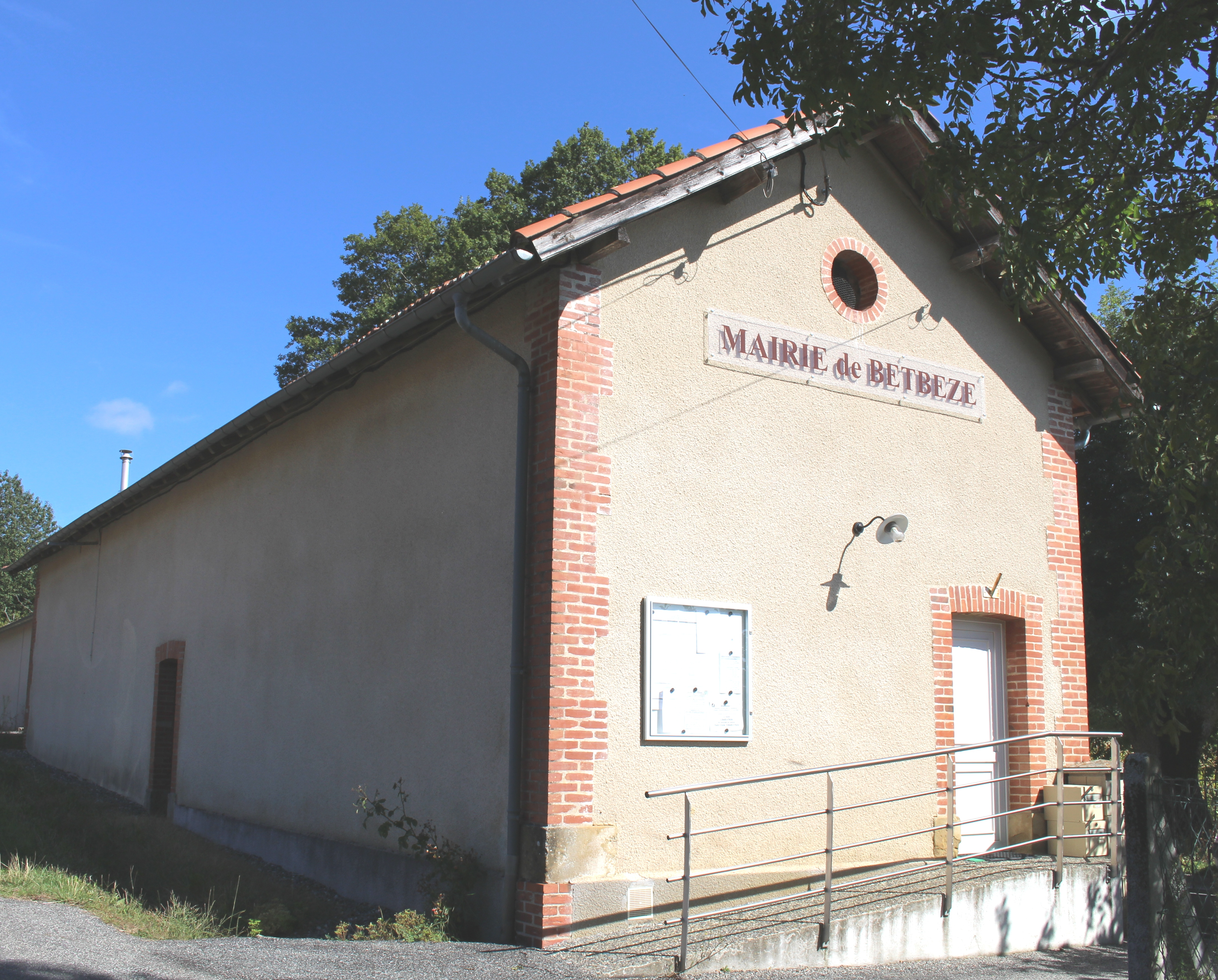 Mairie de Betbèze (Hautes-Pyrénées)